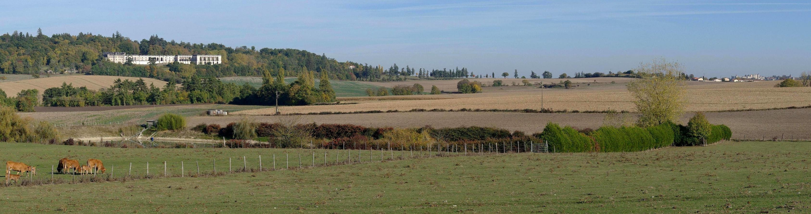 Paysage du château de La Mercerie.Sur la droite, on aperçoit Villebois-Lavalette. Vue prise de l'ouest, depuis Rodas (D5), commune de Magnac-Lavalette, Charente, France.